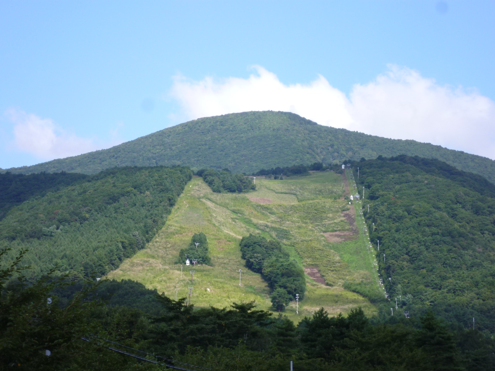 Mt.Izumi